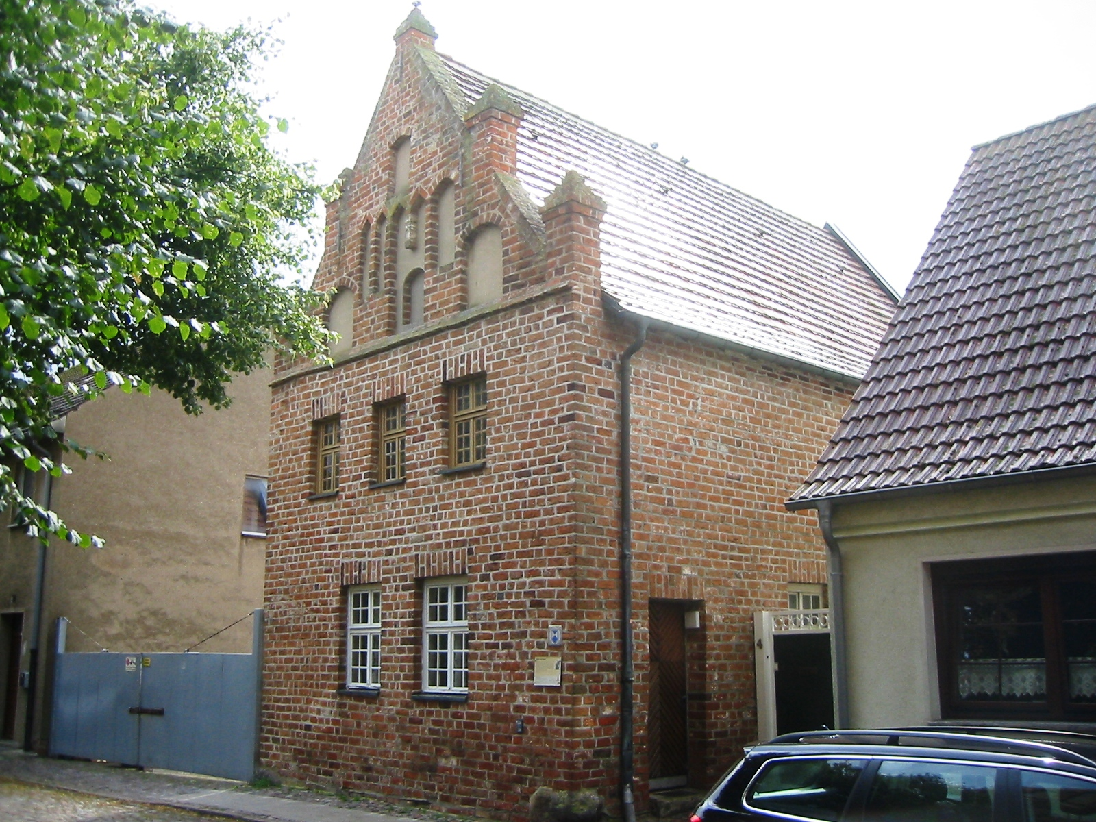 Denkmalgeschützte "Alte Schule" (auch Kalandhaus genannt) in Grimmen, Mecklenburg-Vorpommern